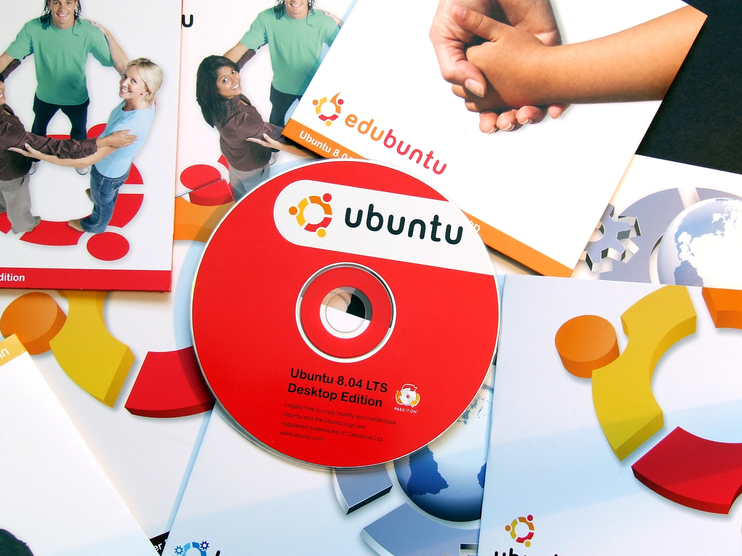 Licensing: This image or multimedia was created by Bartosz Senderek. The image or audio is licensed under CC-BY license. Attribution to me is required. Licencja: Ten obrazek lub plik multimedialny został stworzony przez Barotsza Senderka. Został on udostępniony na licencji CC-BY. Informacja o moim autorstwie jest wymagana. "I want to use the image/multimedia. How can I do that?" You can use this image/multimedia freely for any purpose, including commercial use, provided that you license it under the above license. My suggestion is to use text shown below: If you use the image I would appreciate it if you would let me know on my talk page, but this is not required as long as you follow the above license. "Chcę użyć tego pliku. Jak mogę to zrobić?" Możesz używać tej grafiki/multimediów darmowo w każdym celu, włączając użycie komercyjne, udostępniając go dalej na powyższej licencji. Jeśli zdecydujesz się na publikację zdjęcia mojego autorstwa obowiązkowo podpisz go w sposób podany w sekcji "Licensing text". Jeżeli użyłeś mojego pliku możesz powiadomić mnie o tym na mojej stronie dyskusji, lecz nie jest to wymagane, dopóki trzymasz się powyższej licencji.